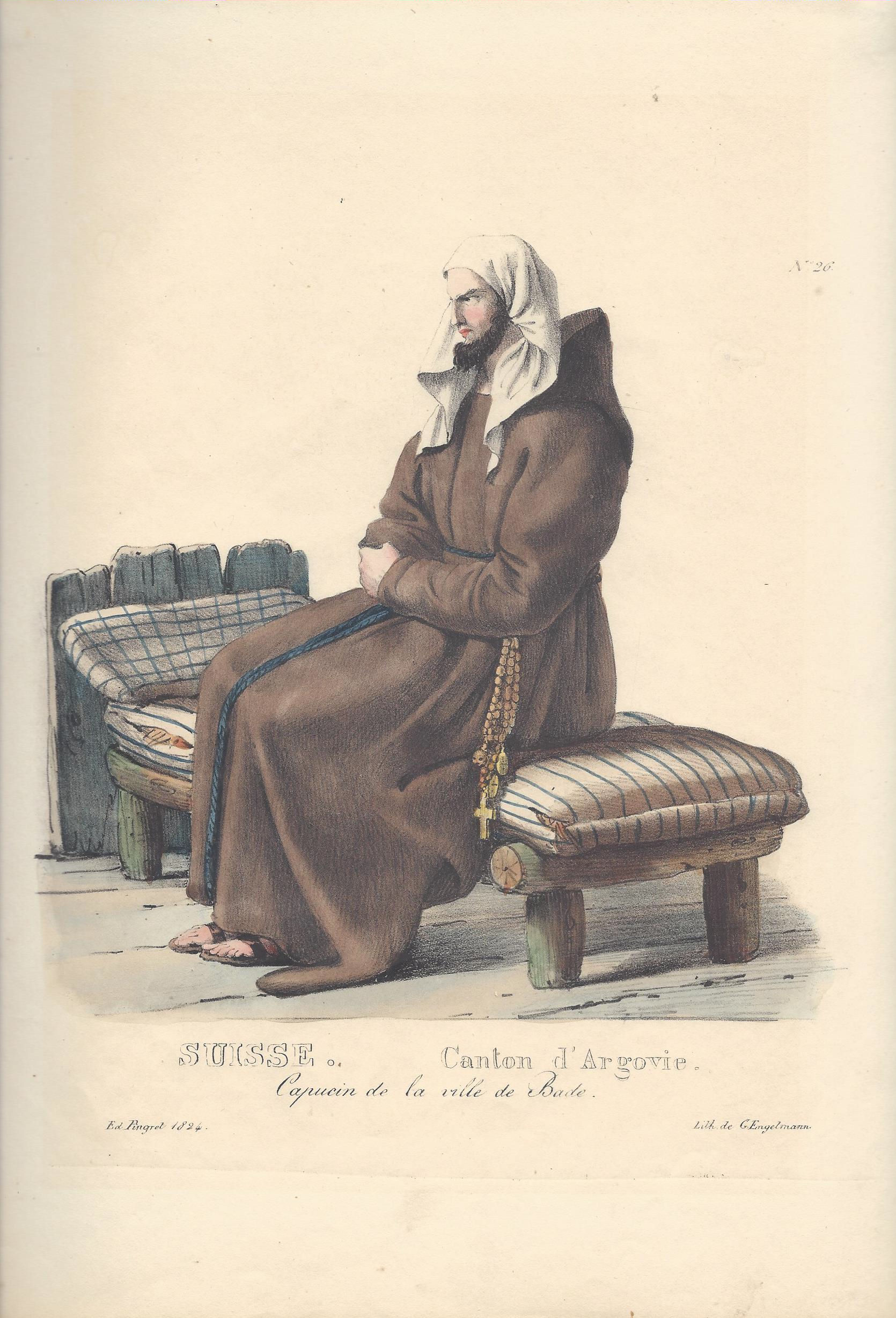 Édouard Pingret: Capucin de la ville de Baden, Lithografie bei Engelmann, 1824 (Kapuziner aus der Stadt Baden /Aargau).